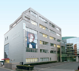 名古屋市千種区の理容美容専門学校アリアーレビューティー専門学校